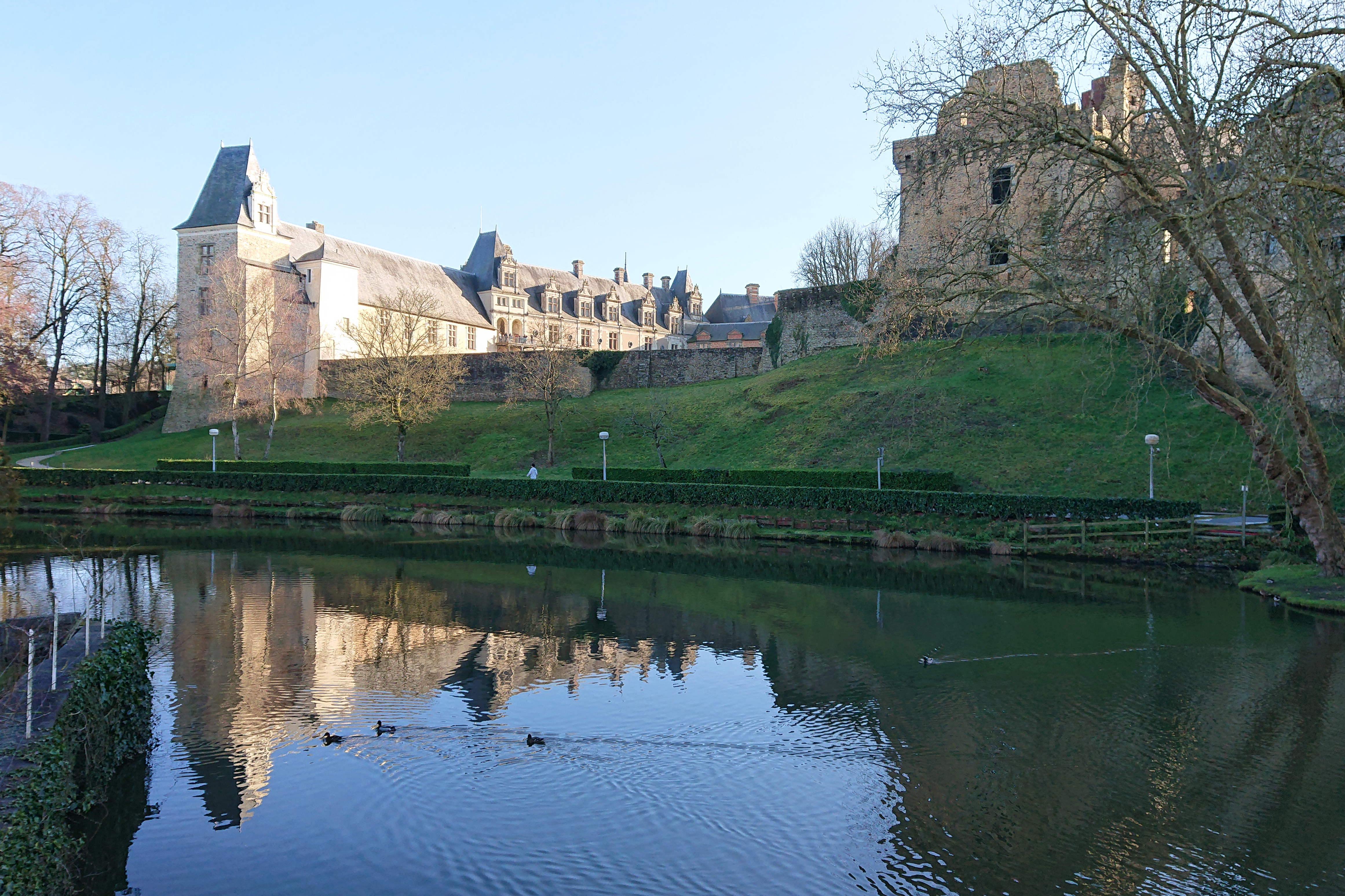 Le château vu depuis l'étang de la Torche, Châteaubriant, France.